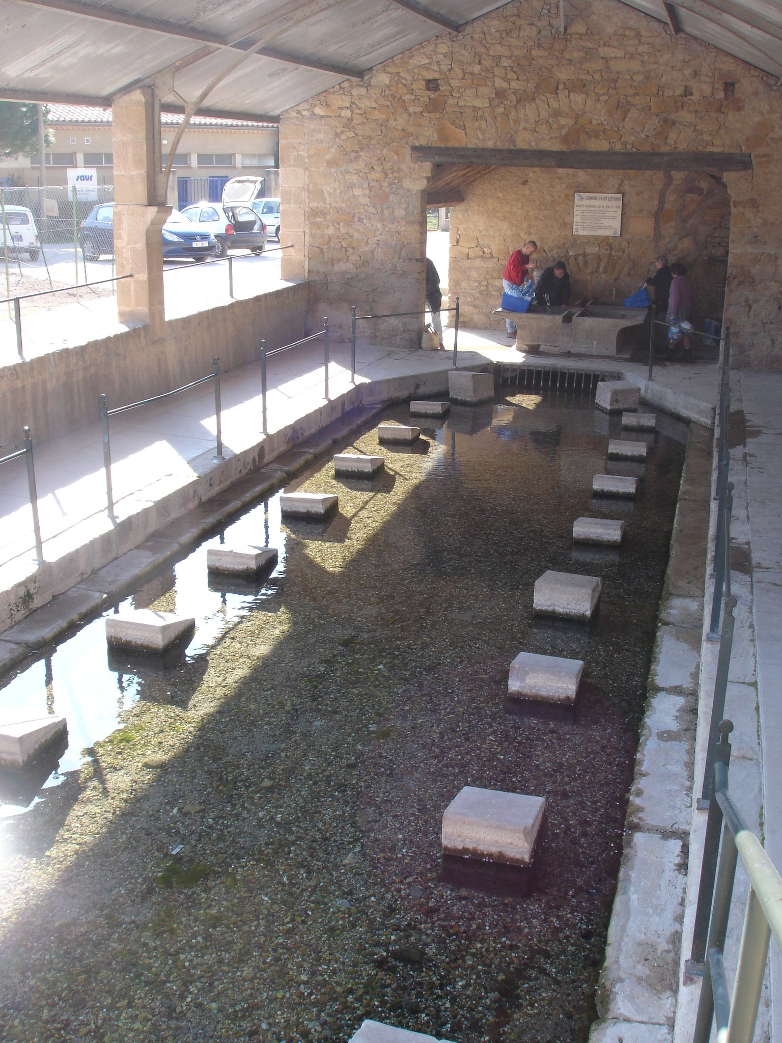 France - Aude (11) - Alet-les-Bains - Lavoirs